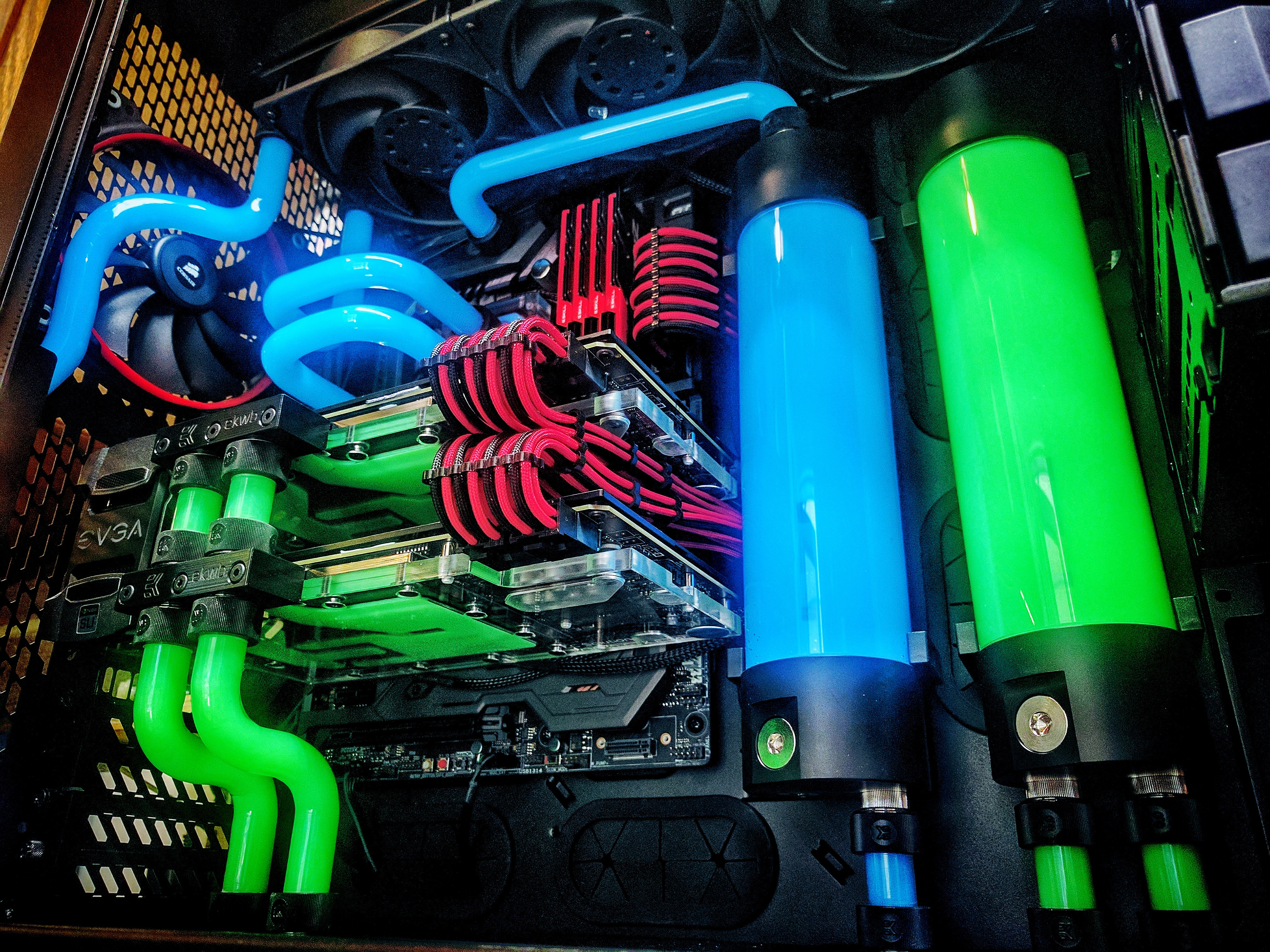 Interior de una computadora con refrigeración líquida, mostrando el circuito y el bloque de la CPU.